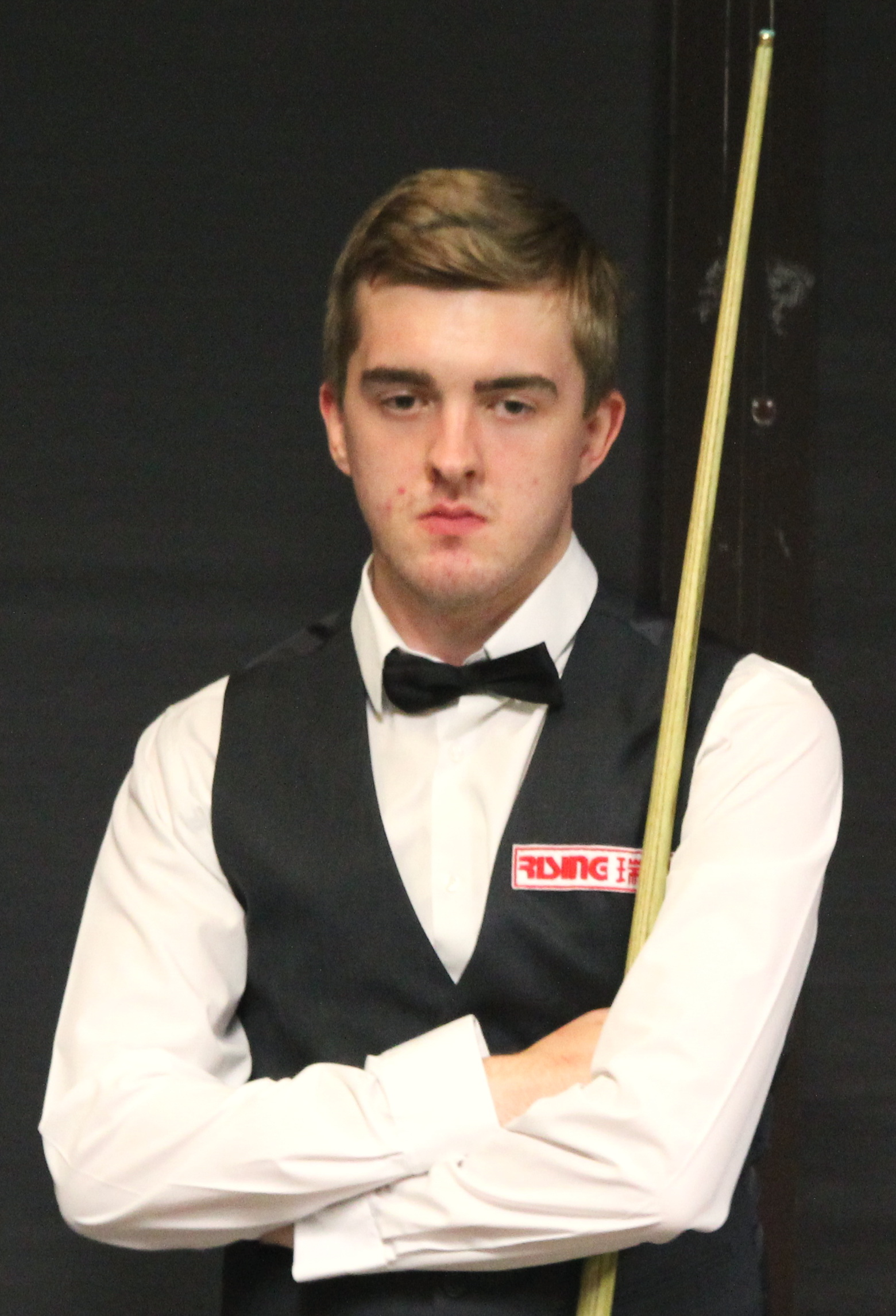 Ross Muir beim Paul Hunter Classic 2016